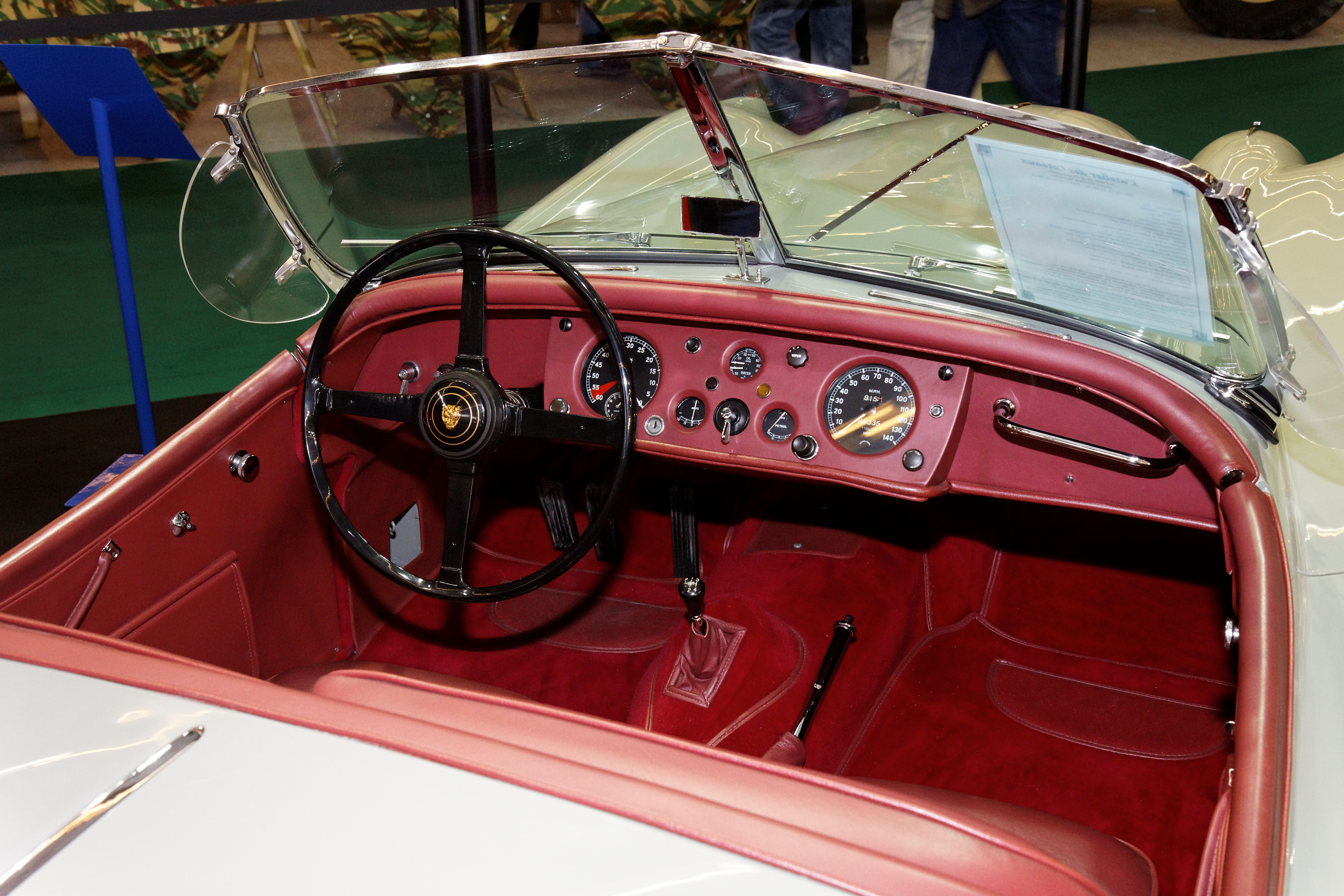 Photographie prise lors du salon rétromobile 2011 à Paris, porte de Versailles.